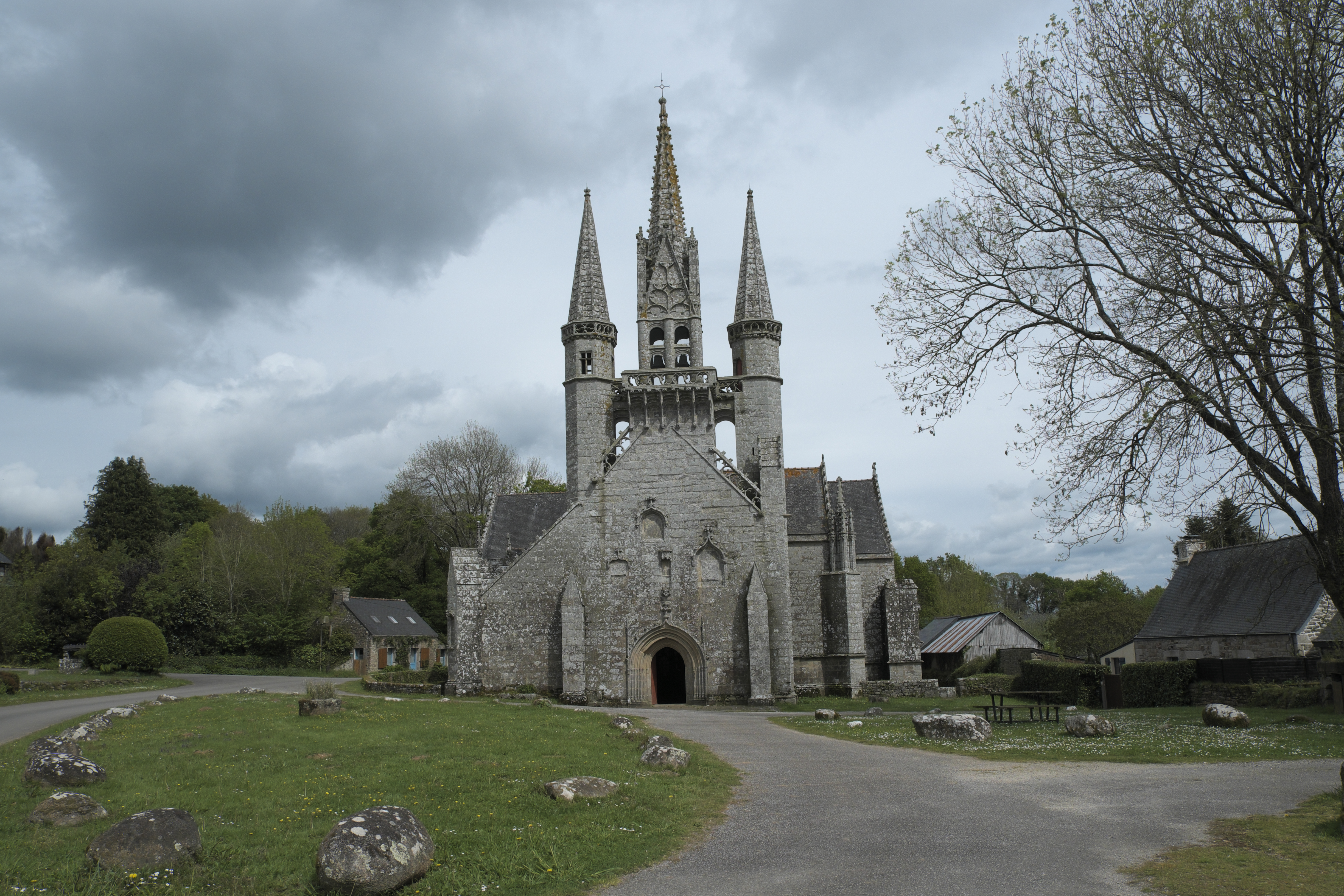 Kapelle Saint-Fiacre in Le Faouët im Département Morbihan (Region Bretagne/Frankreich), Westfassade